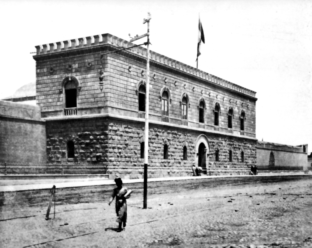 Edificio de la Penitenciaría de Lima, construido en el primer gobierno de Ramón Castilla (1845-51).